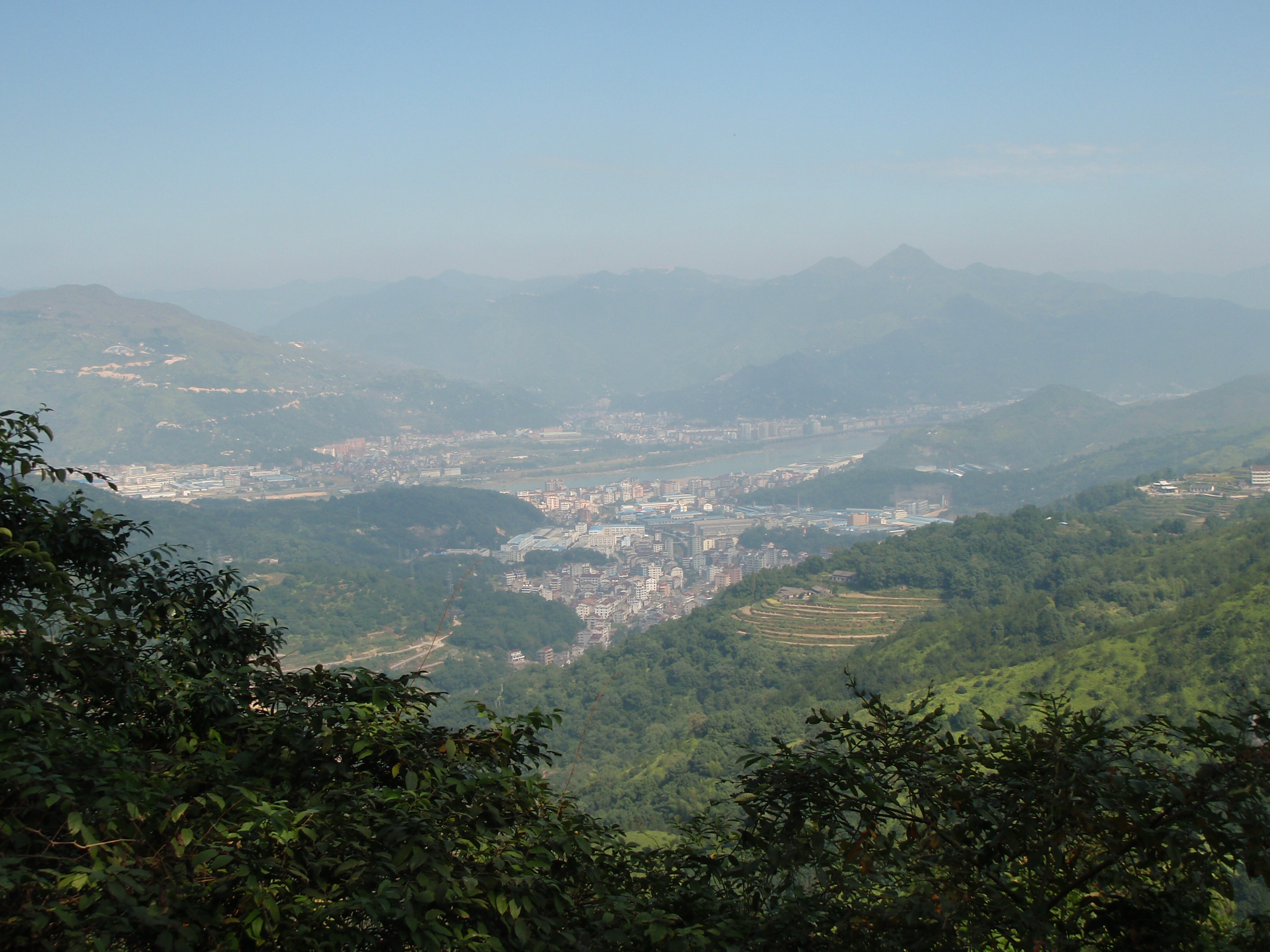 泥山古道看温溪